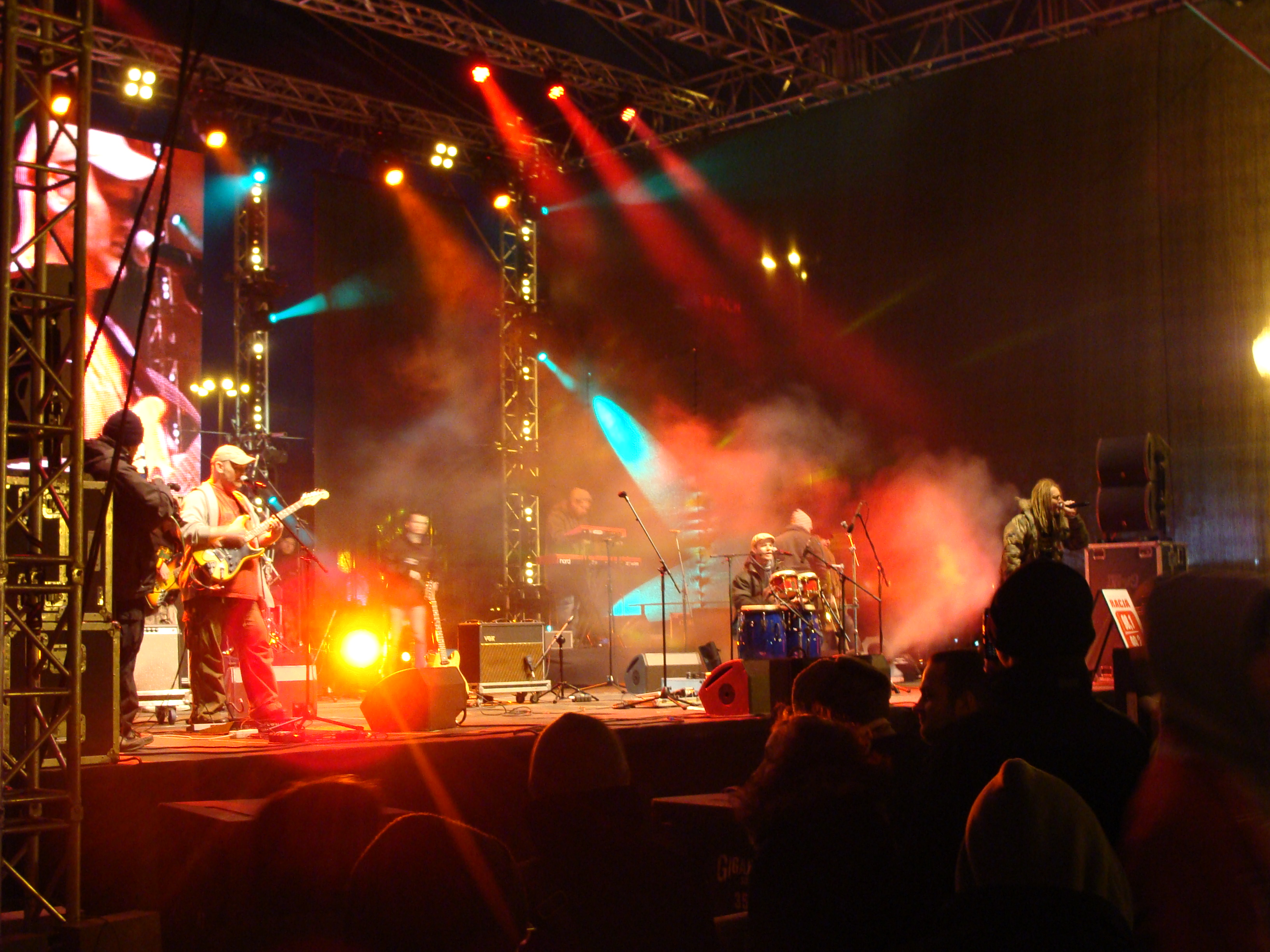 Koncert "Solidarni z Białorusią" 27 marca 2011 roku na placu Defilad w Warszawie.